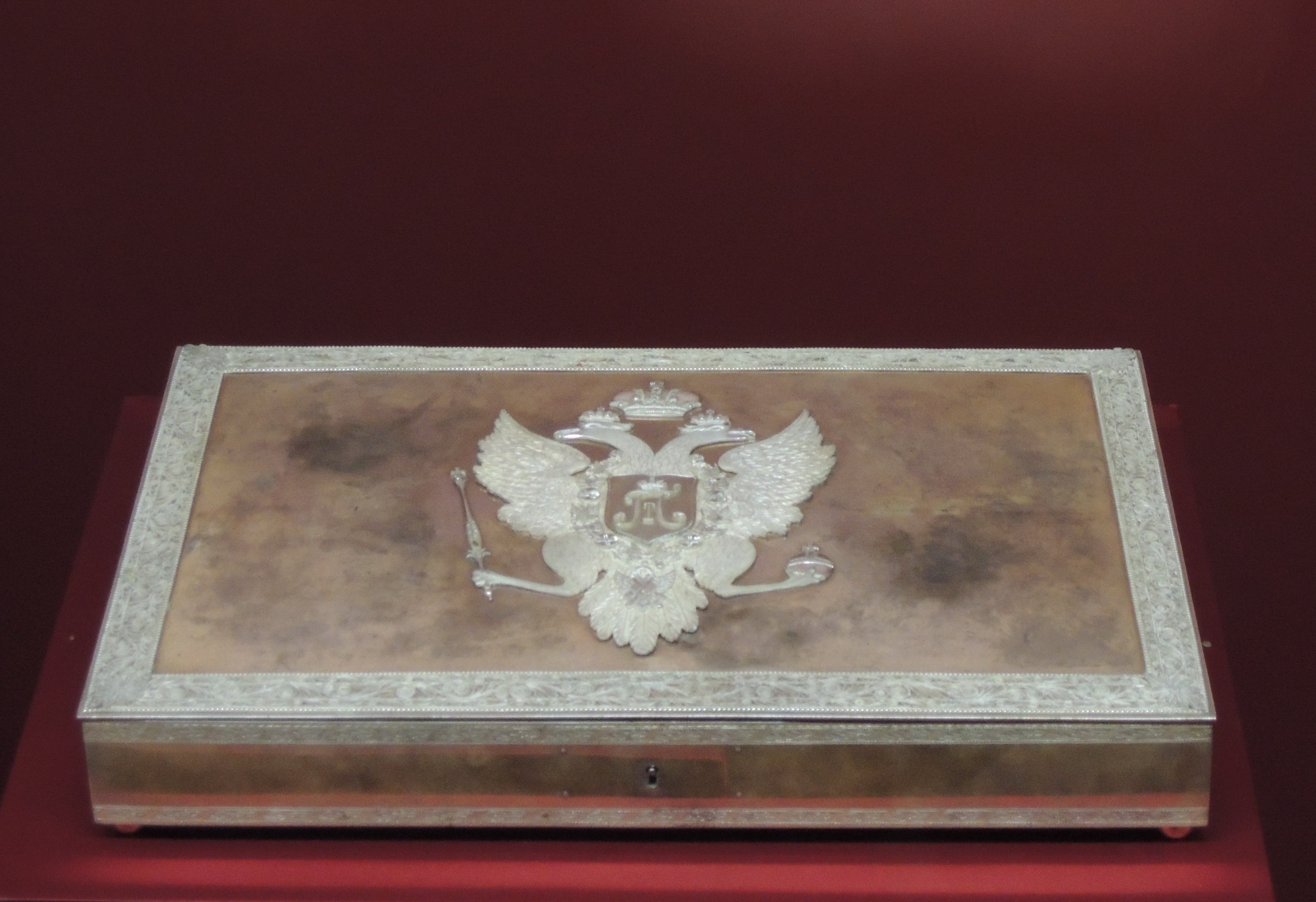 Ларец для хранения Акта о престолонаследии. Санкт-Петербург. Мастер Ивар Венфельд Бух. Серебро, недрагоценный металл, муар; литье, чеканка, ткачество. 22,5х35х5. Государственный архив РФ. Акт, который император собственноручно поместил в серебряный ларец, хранился на престоле Успенского собора. Верхнюю крышку украшает накладной герб империи с монограммой Павла I на щитке. Ларец закрывается на ключ и хранится в обитом голубым бархатом деревянном футляре на атласной подкладке. На протяжении XIX века ларец пополнялся другими важными документами государственного значения - Манифестом Александра I от 20 матра 1820 г. о запрете неравнородных браков, документами о передаче прав на наследование престола будущему Николаю I, формами присяги для наследника престола (22 апреля 1834) и членов императорской фамилии (1 декабря 1851), Манифестом Александра II о регентстве и опеке (21 мая 1855). Всего к концу 19 века в нем хранилось 7 документов, которые в 1880 году по распоряжению Алексадра II были переданы вместе с ларцом в Государственный Архив. Выставка "Венчания на царство и коронации в Московском Кремле" (2013)